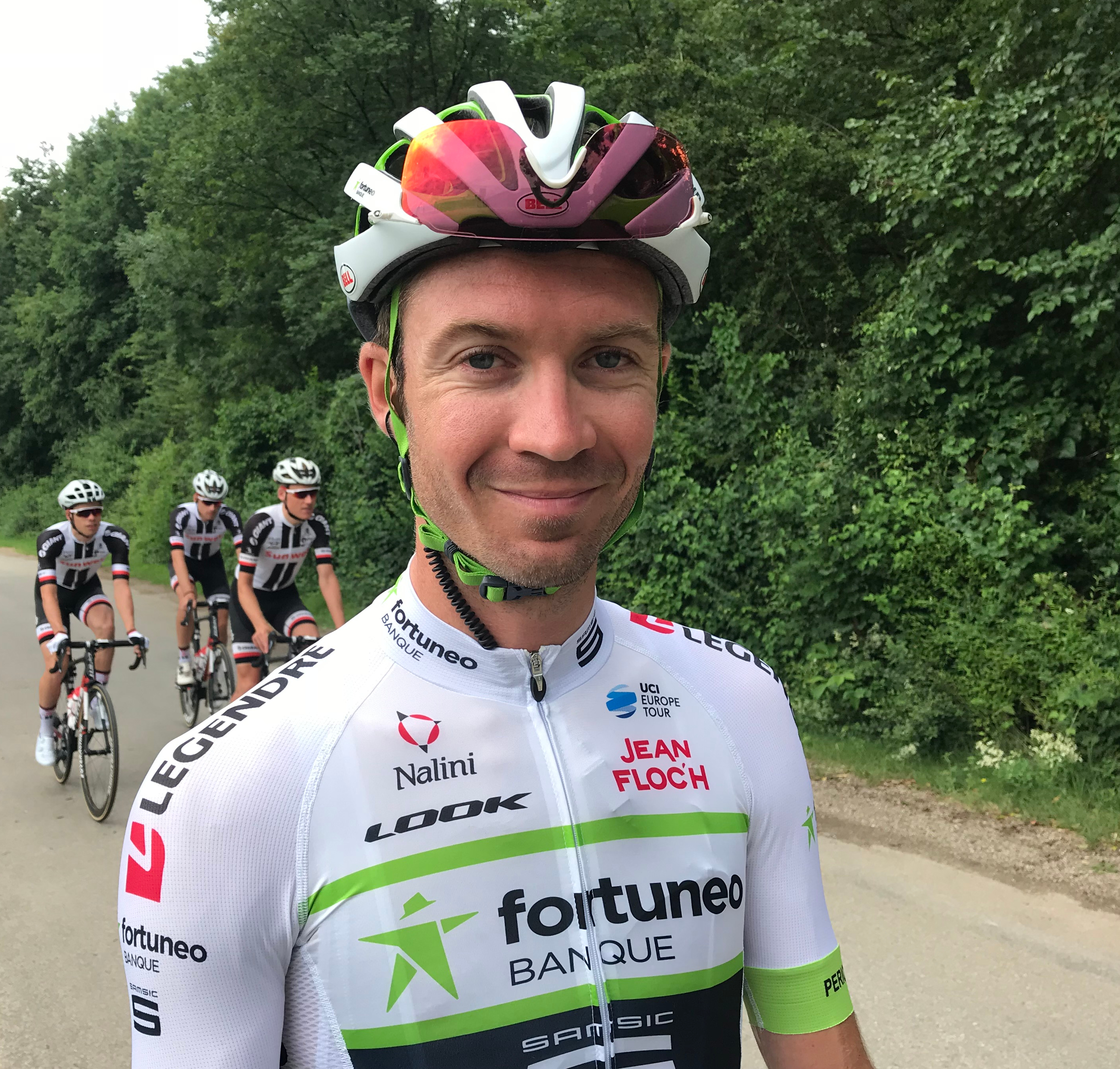 Pierre-Luc Périchon sur le Critérium du Dauphiné 2018, étape 4 (départ) au parc du cheval de Rhône-Alpes (Chazey-sur-Ain).